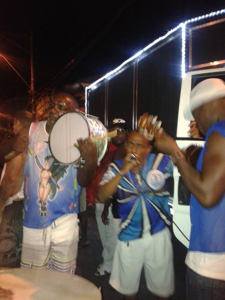 ingle